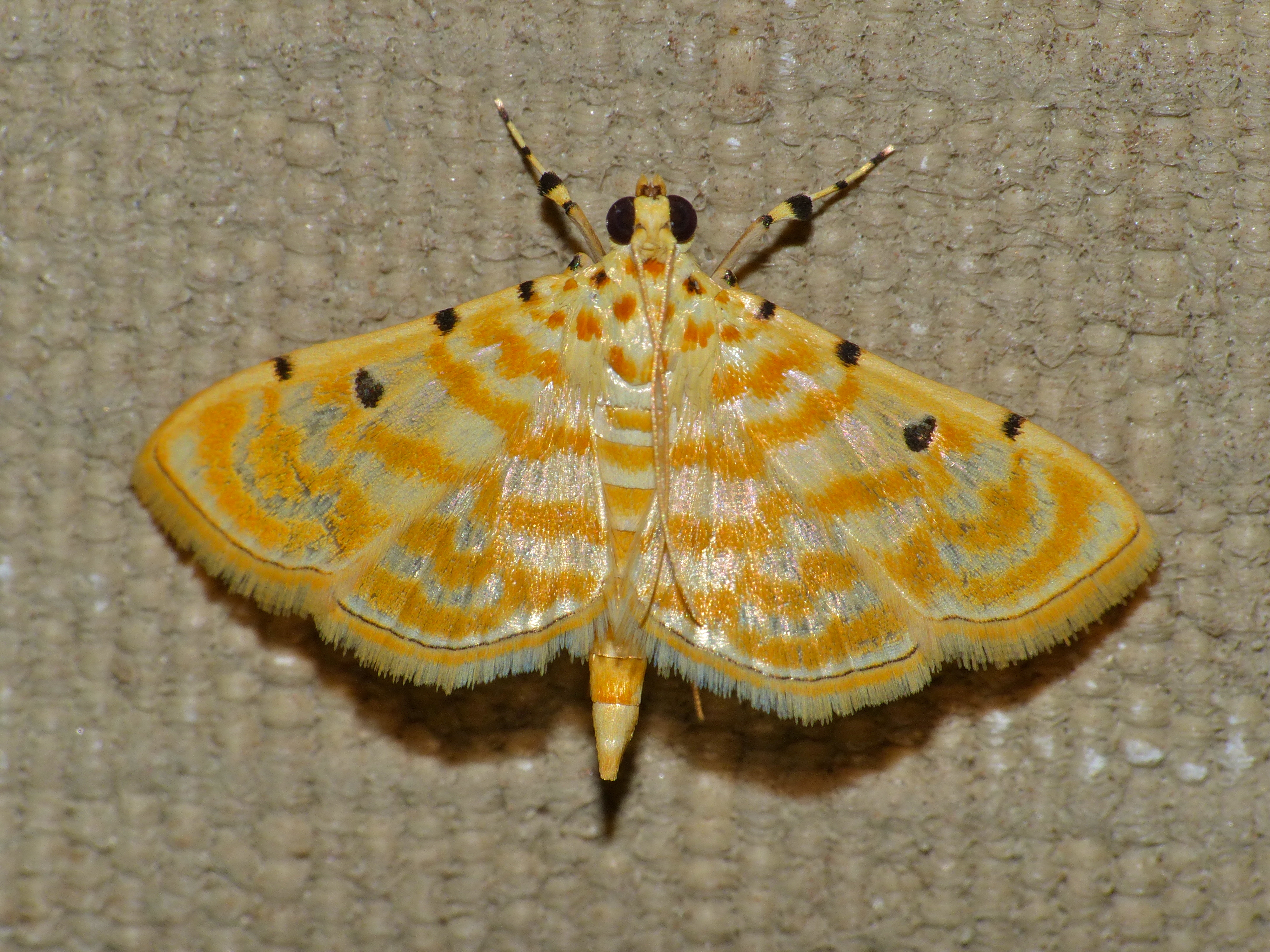 Safari Tent N°12, Lower Sabie Camp, Kruger NP, SOUTH AFRICA